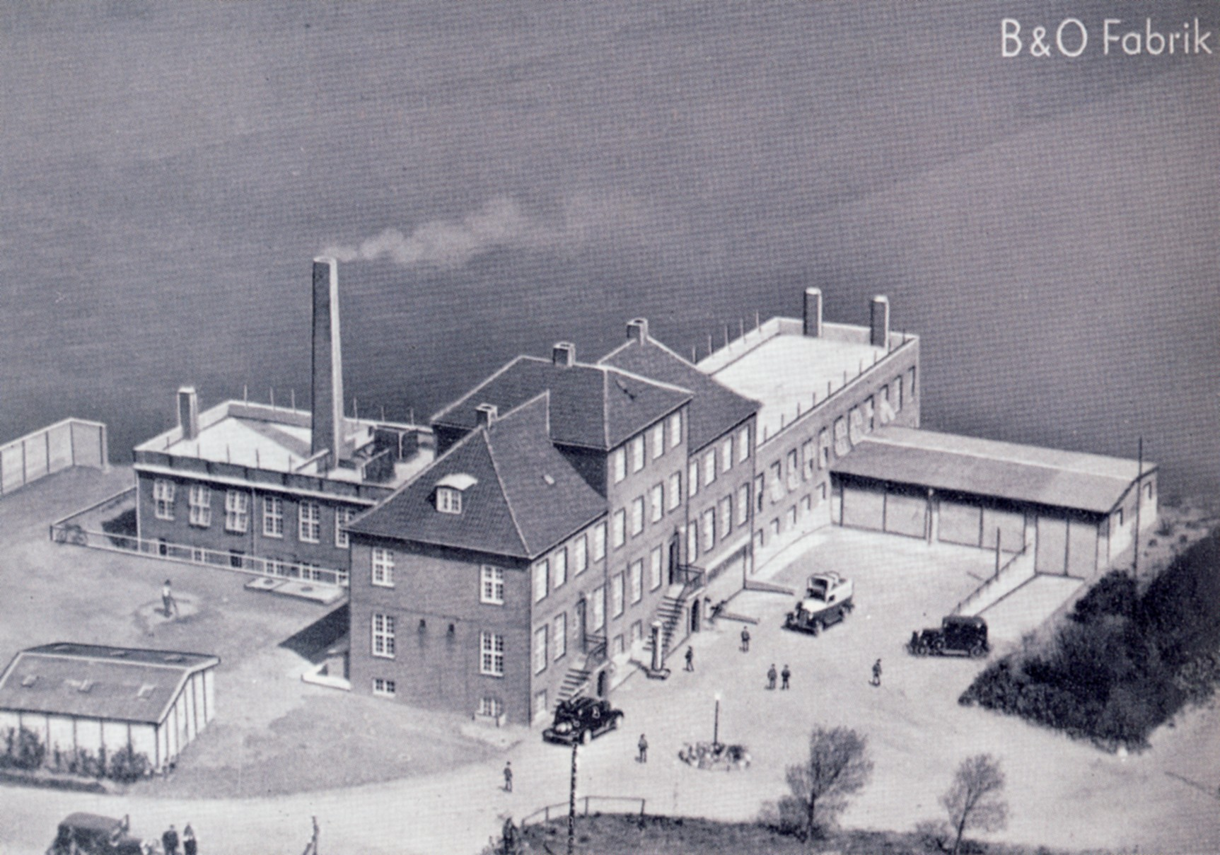 Bang & Olufsens fabrik i Struer 1938